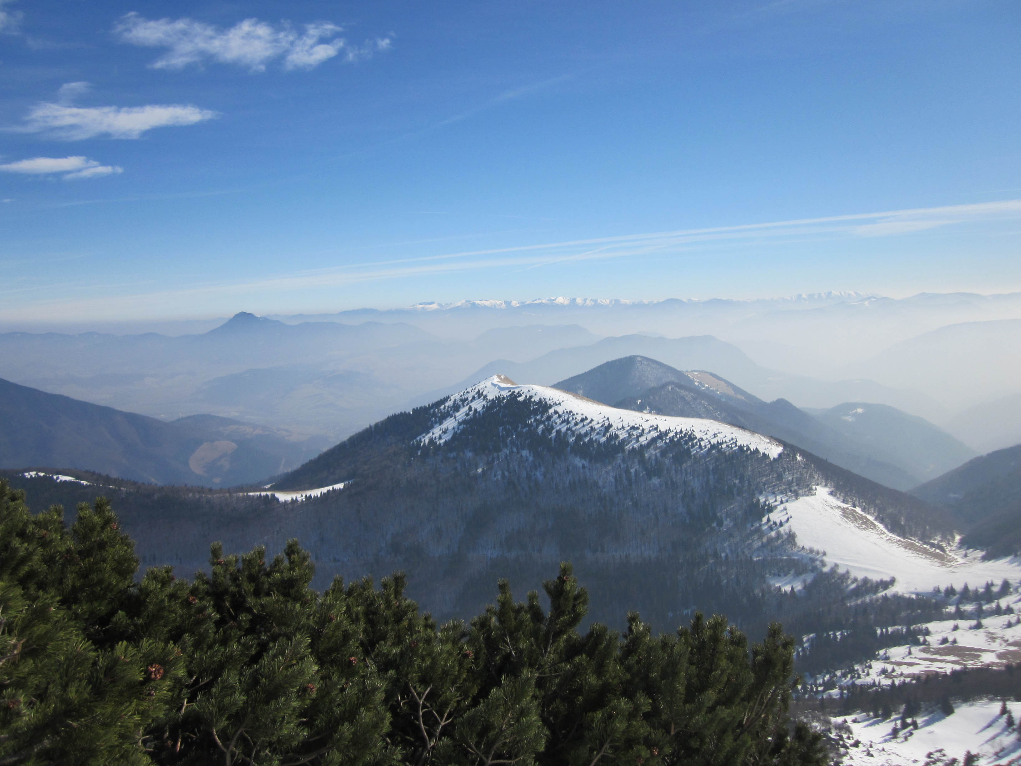 Osnica, vrch v Malej Fatre 1 363 m n. m.